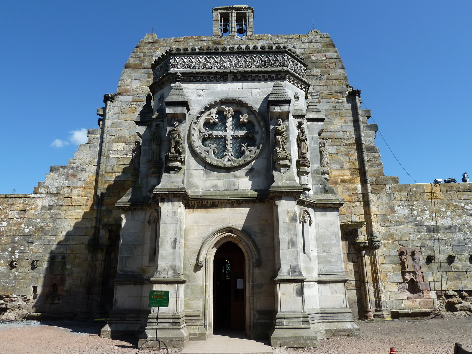 A Rosslyn-kápolna, a templomos lovagok, szabadkőművesek, és összeesküvésgyártók Mekkája (The Rosslyn Chapel, Mekka of the Knight Templars, Freemasons and Conspiracy Theorists)